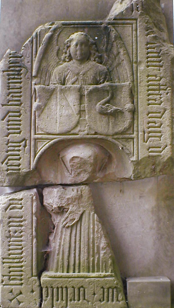 Historische Grabplatte an der Ev. Kirche von Waibstadt-Daisbach